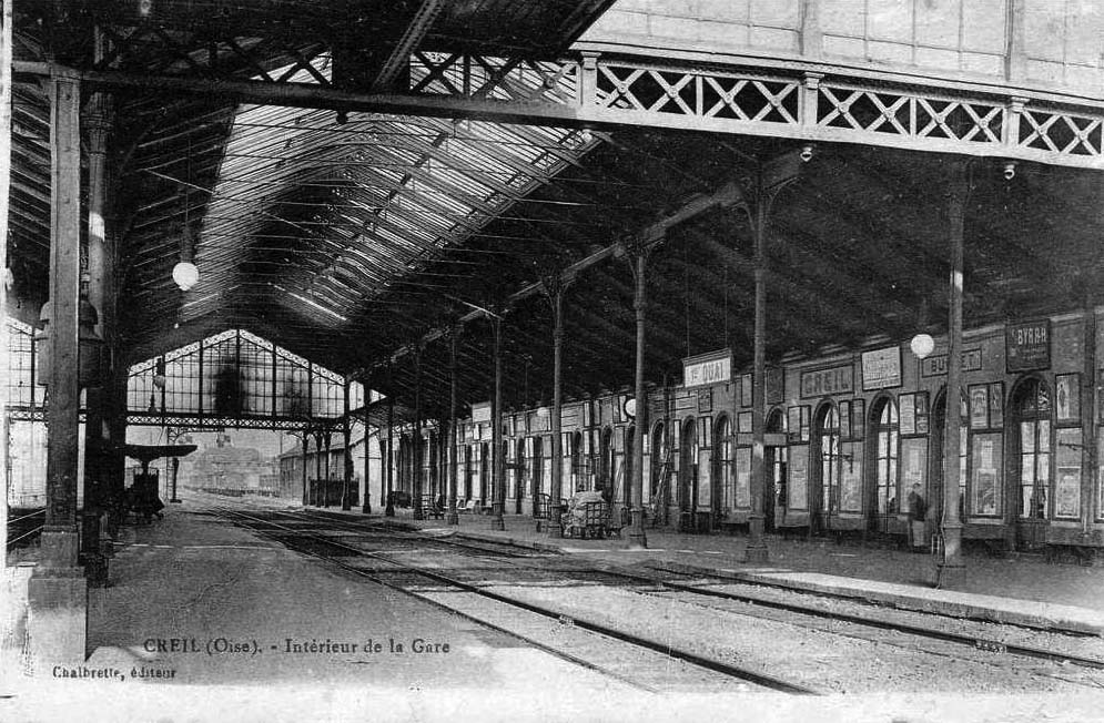 L'intérieur de la gare de Creil, avec les voies et les quais sous la grande verrière au début des années 1900.